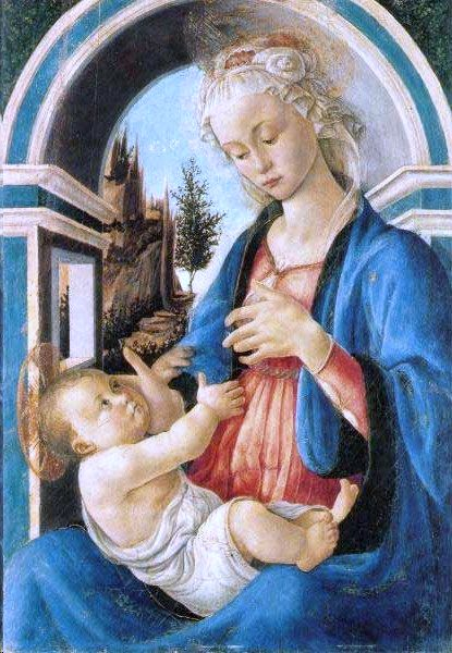 Madonna con Bambino, Sandro Botticelli Musée du Petit Palais di Avignone